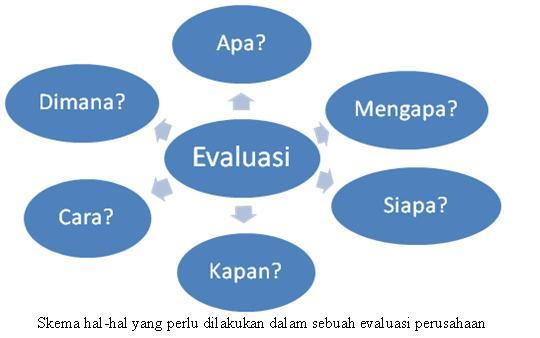 hal-hal yang perlu diperhatikan dalam melakukan evaluasi kinerja perusahaan.